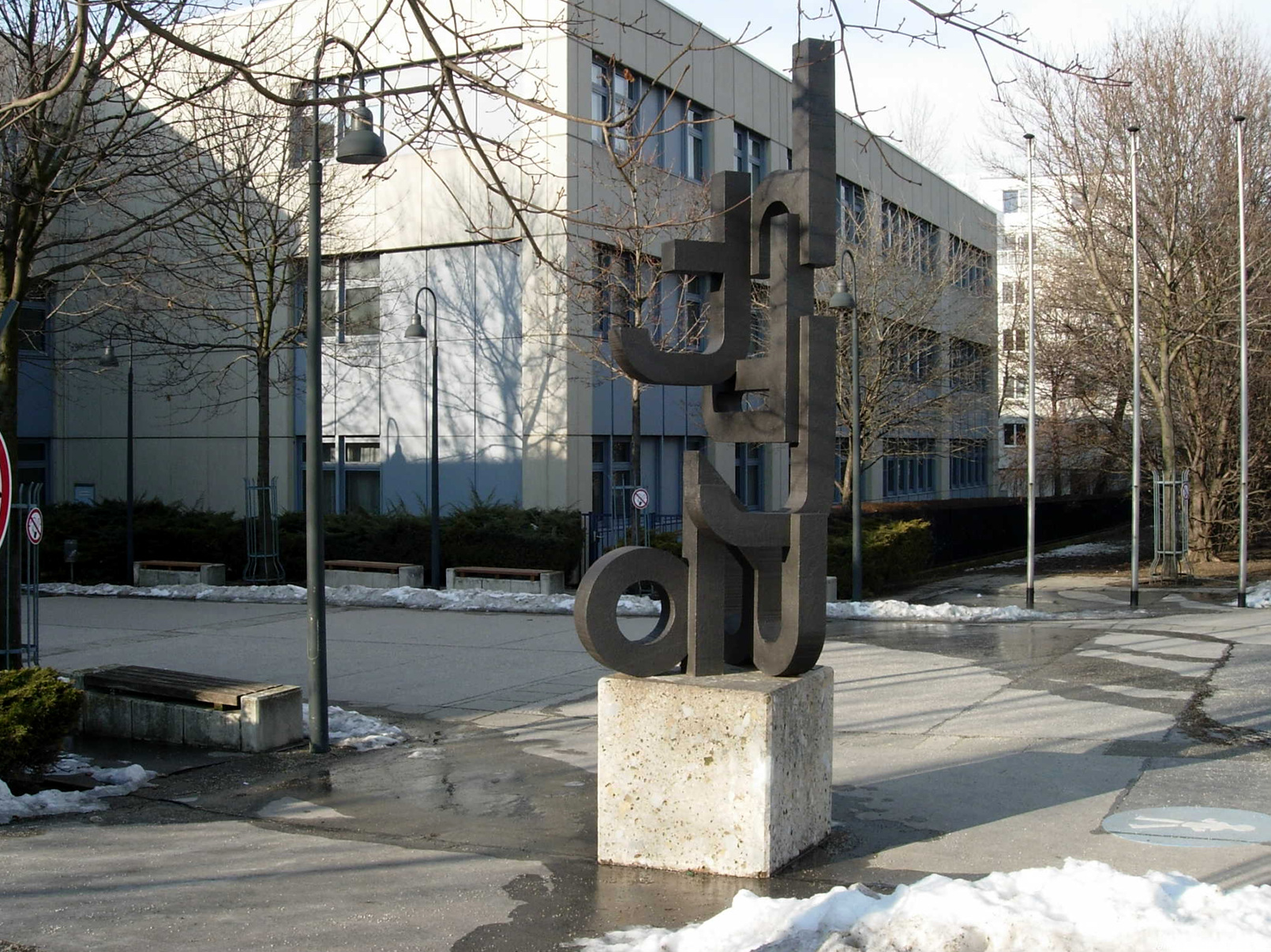 Skulptur vor der HTL Ettenreichgasse in Favoriten, Wien